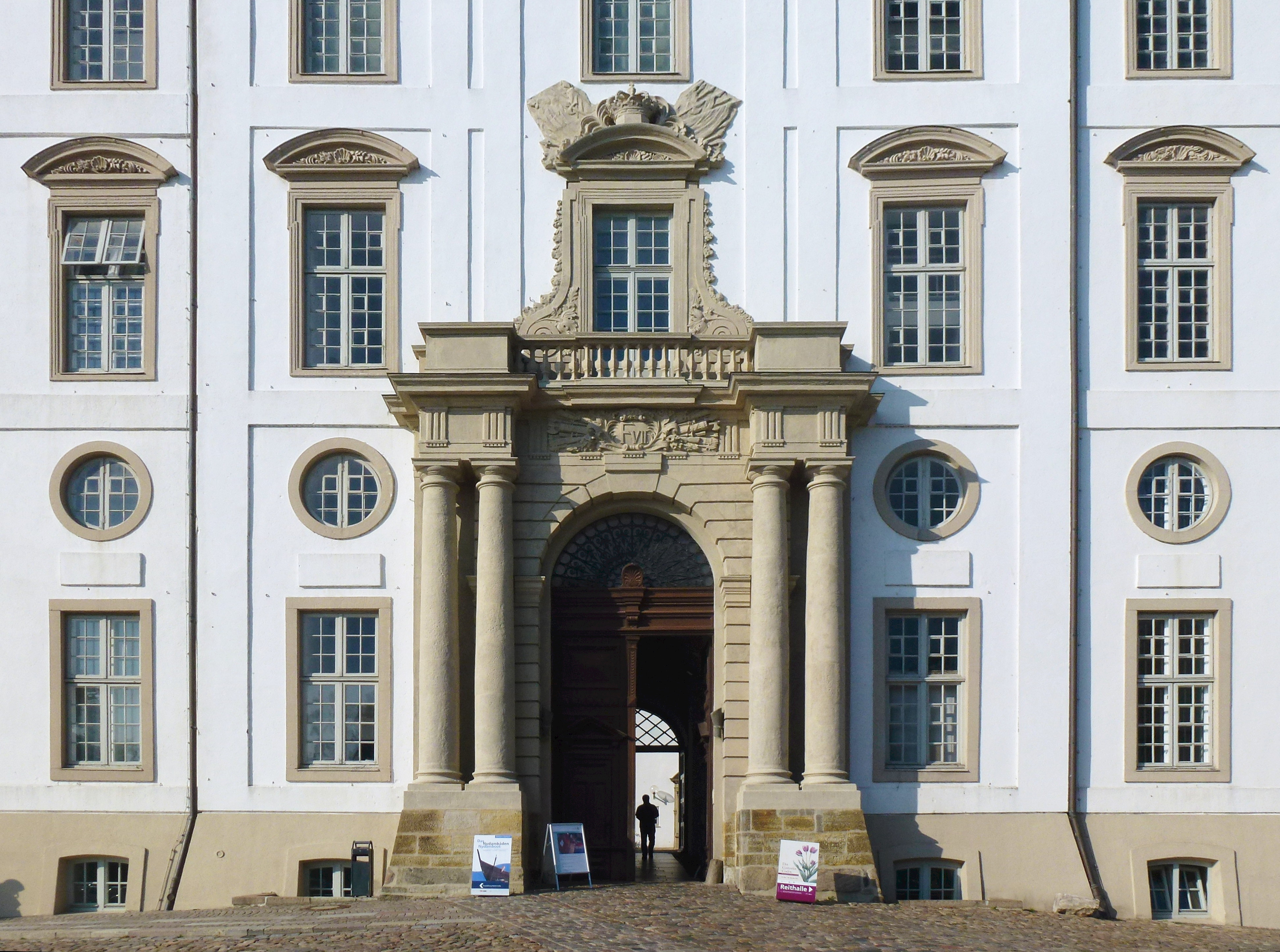 Huvudportal Gottorp